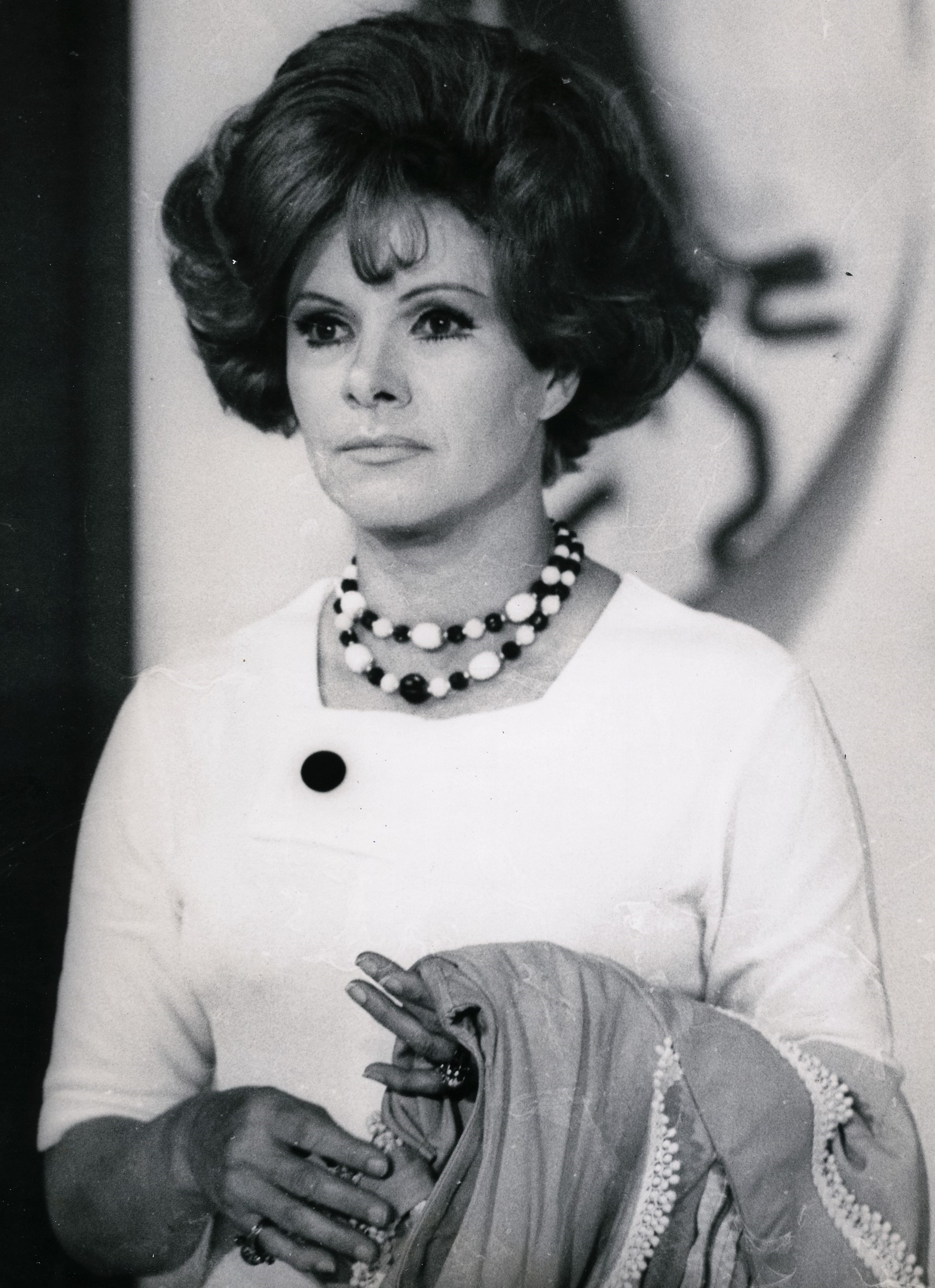 Eloísa Mafalda na novela Pigmalião 70. Fundo Correio da Manhã, 1970. Número de inventário: BR_RJANRIO_PH_0_FOT_31256_0002